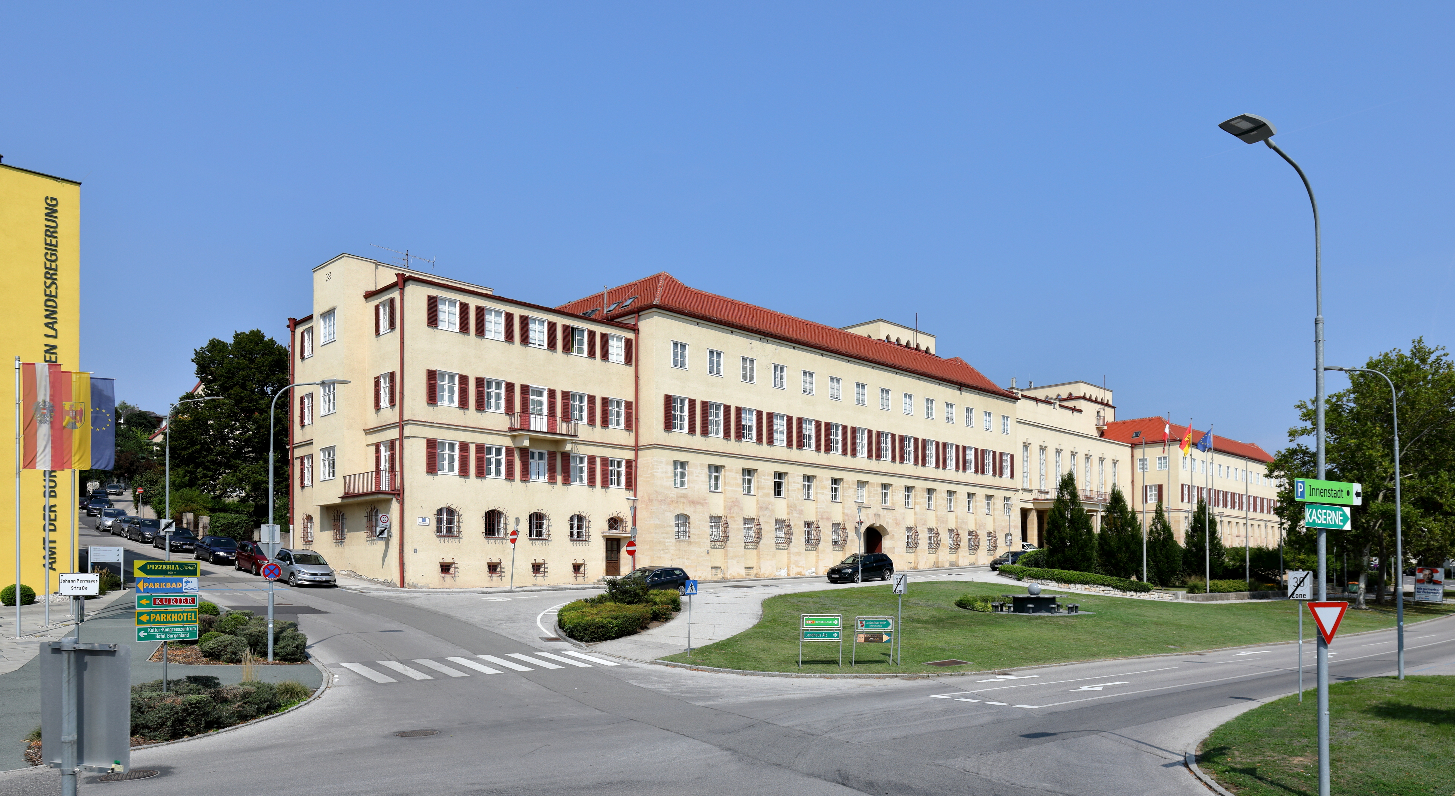 Südansicht des „Landhauses-Alt“ am Europaplatz in der burgenländischen Hauptstadt Eisenstadt und links ein kleiner Teil vom „Landhaus-Neu“.Das Landhaus, Sitz der Burgenländischen Landesregierung, des Burgenländischen Landtages und des Amtes der Burgenländischen Landesregierung, wurde ab 1926 (Spatenstich am 7. Juli 1926) nach Plänen des Architekten Rudolf Perthen errichtet und 1930 bezogen. Ab 1973 wurde westlich vom alten Landhaus ein „Landhaus-Neu“ errichtet und im Juli 1977 feierlich eröffnet.